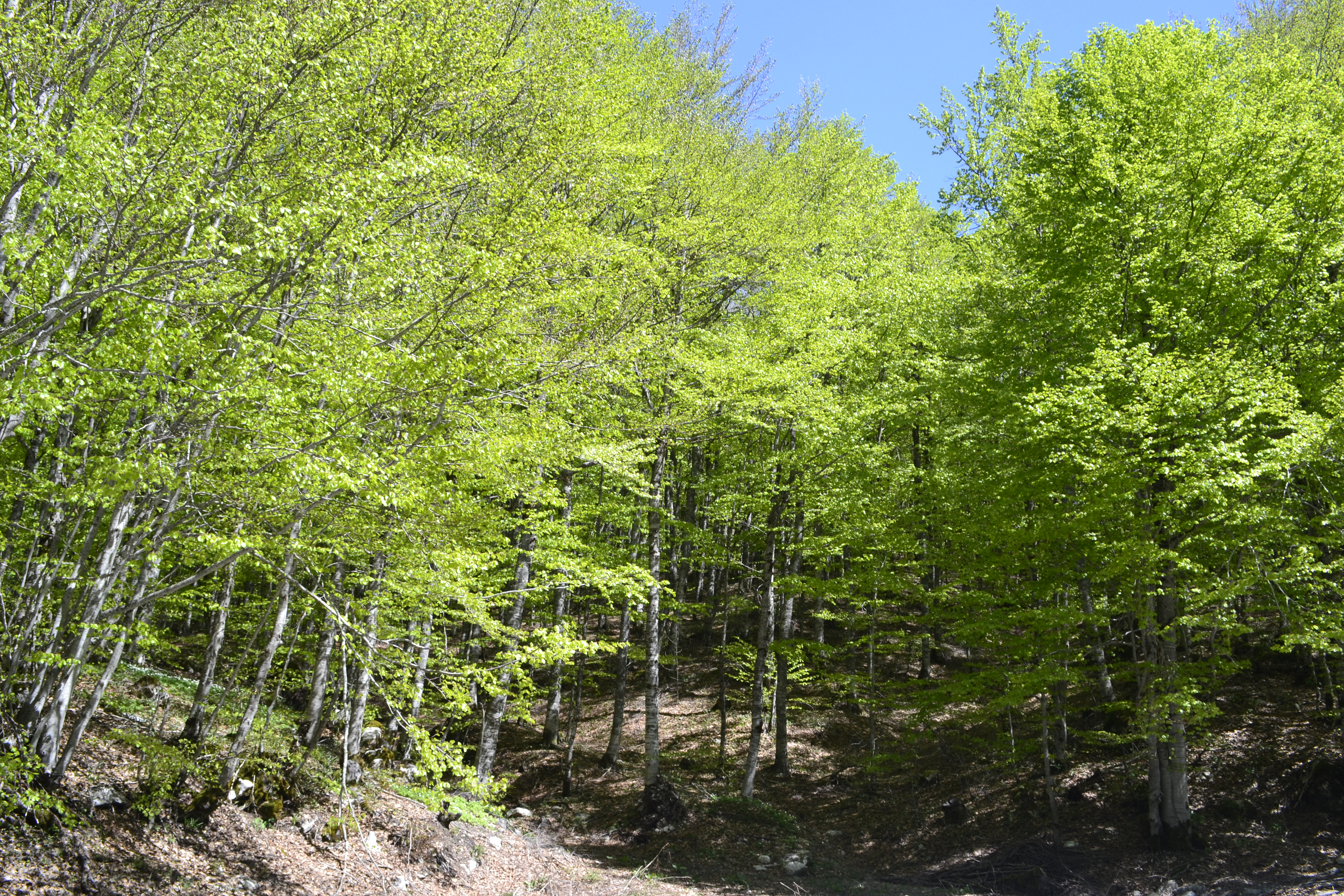 Српски (ћирилица): Букова шума на планини Војник (Црна гора)